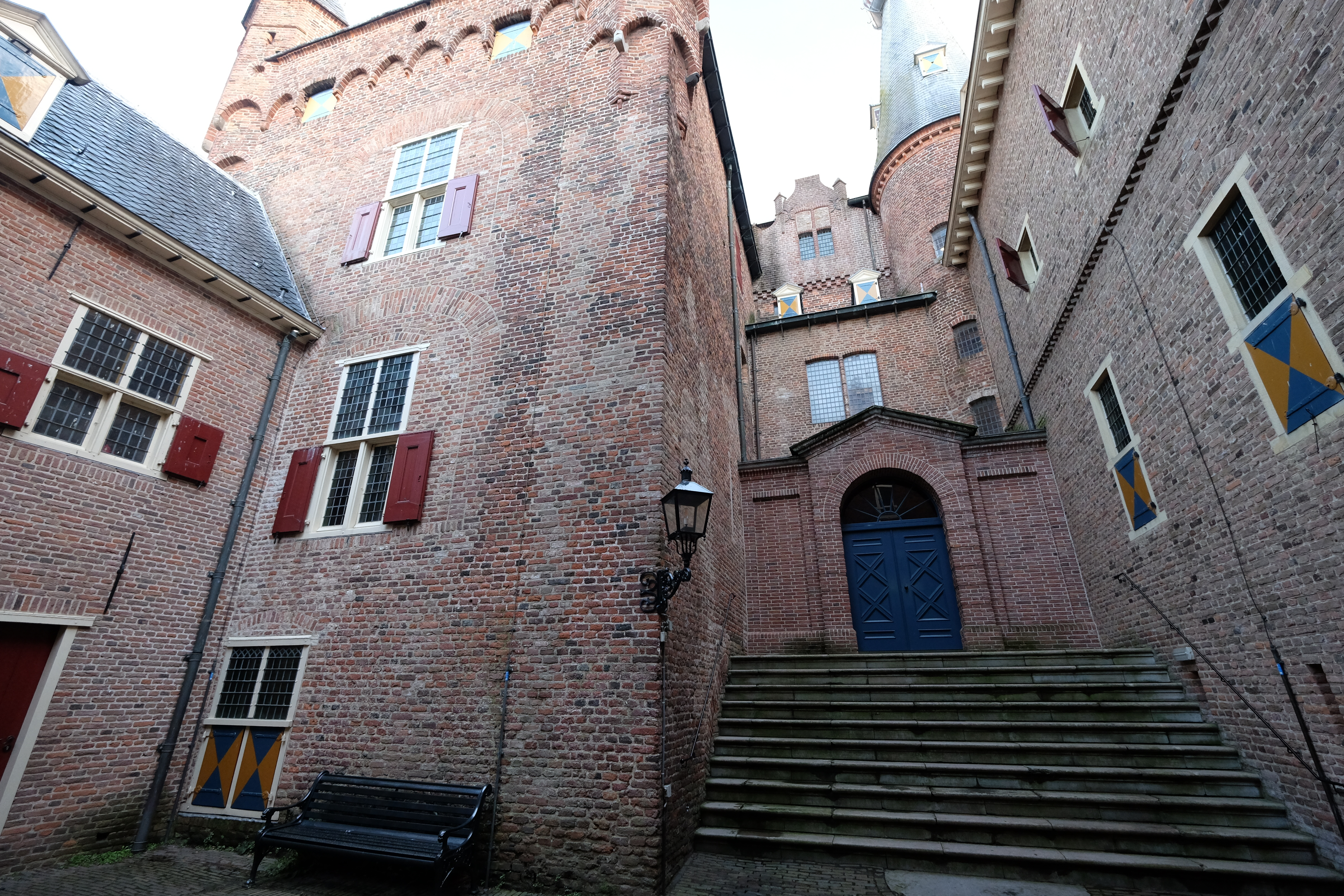 6866 Heelsum, Netherlands